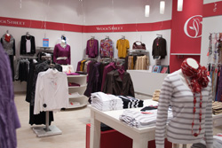 Изображение магазина Woolstreet